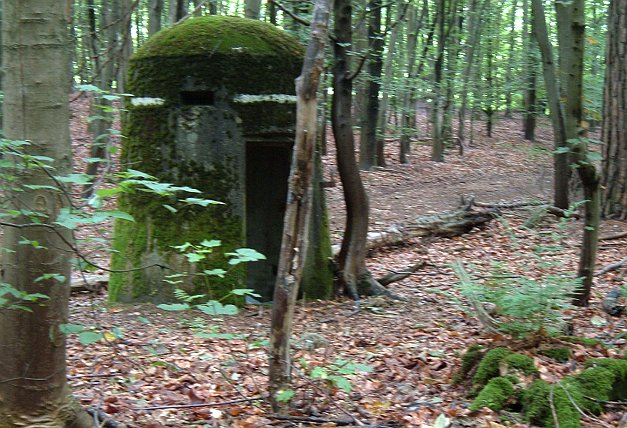 Splitterbunker aus dem Zweiten Weltkrieg im Königsforst.